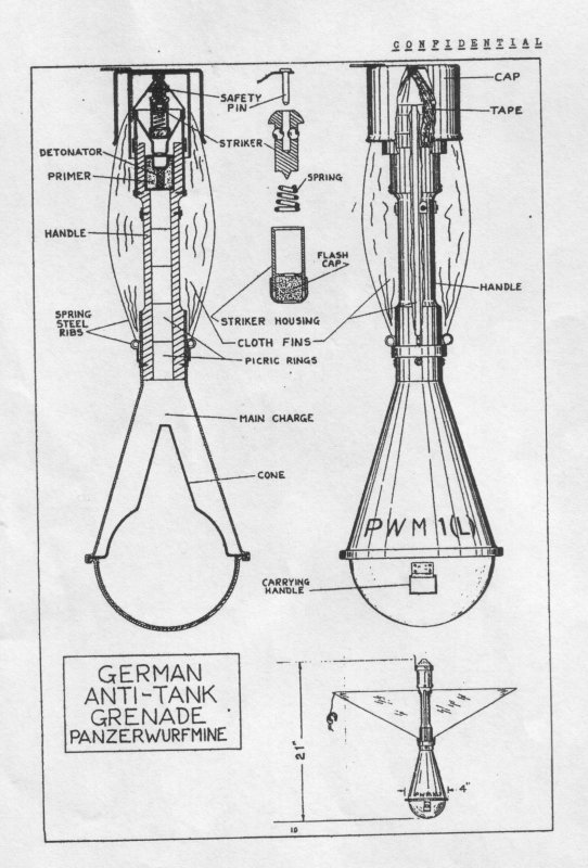 Description américaine et coupe d'une Panzerwurfmine L. Mars 1944.